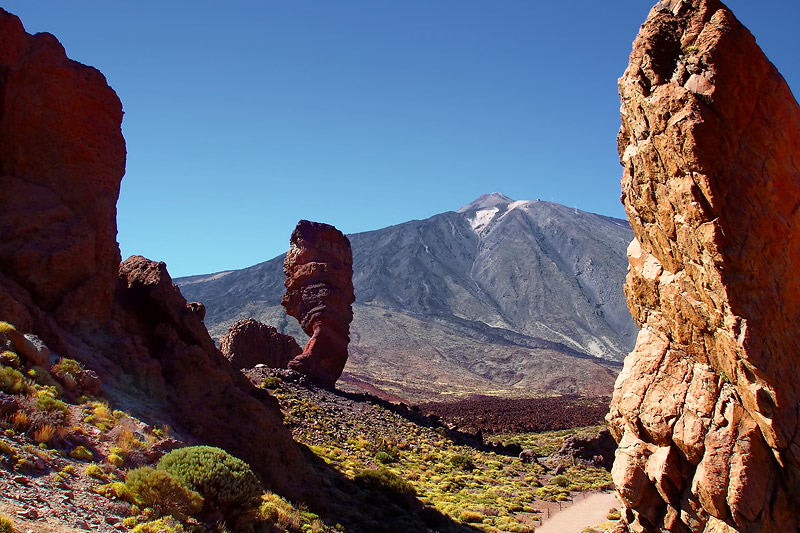 El Teide